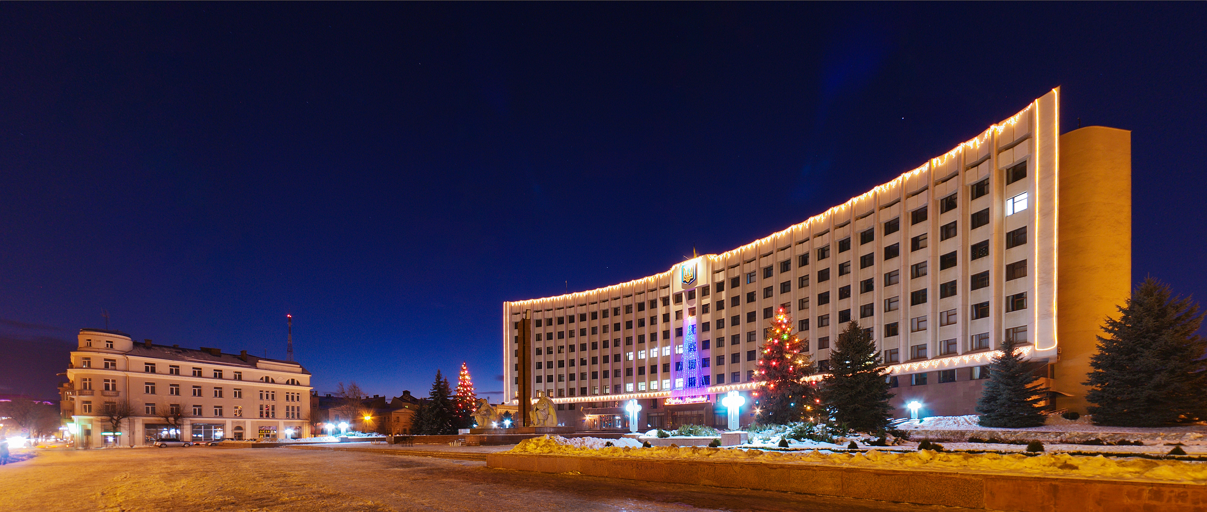 Вечір над Білим будинком / Evening over the administrative building